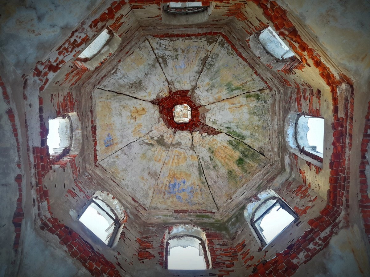 Старая Вадва. Пакроўская царква